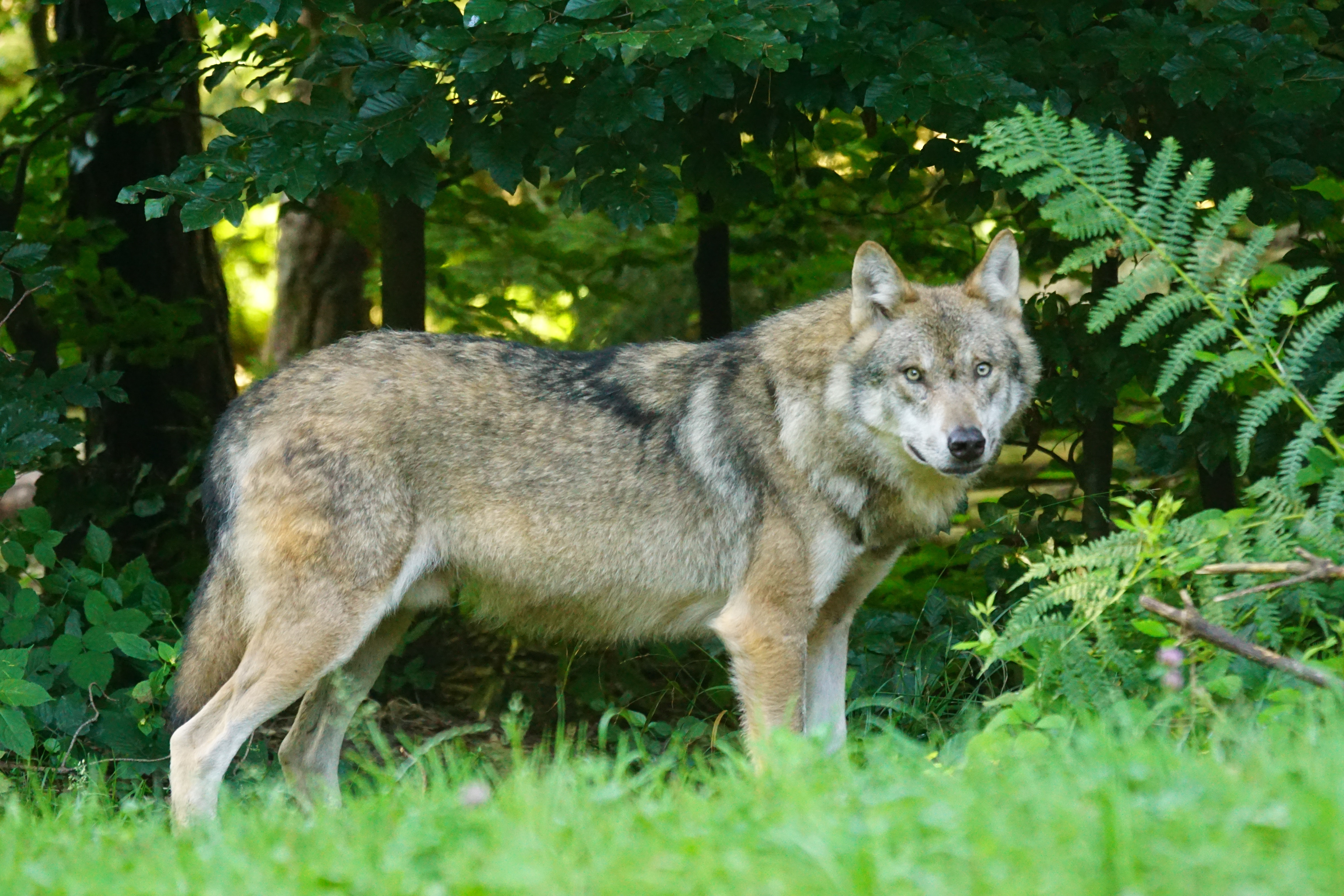 Cette image représente un loup brun.